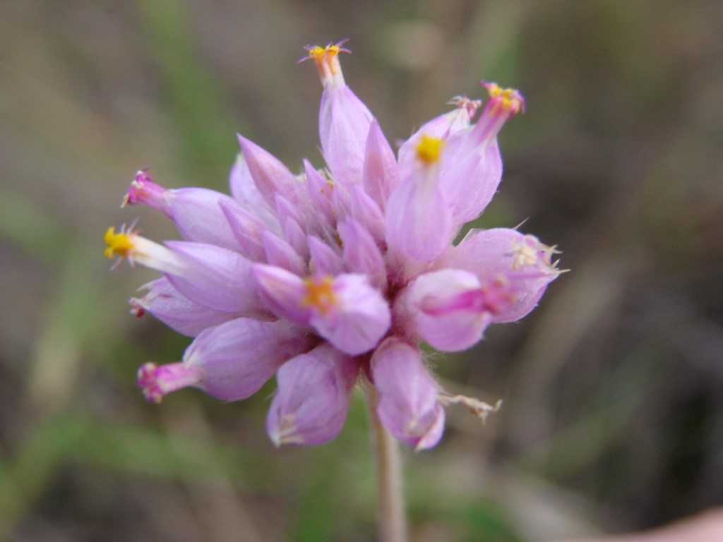 Gomphrena mollis Mart. - AMARANTHACEAE - Chapada Diamantina - Parque Natural Municipal Morro do Pai Inácio - Palmeiras - Bahia - Brasil.